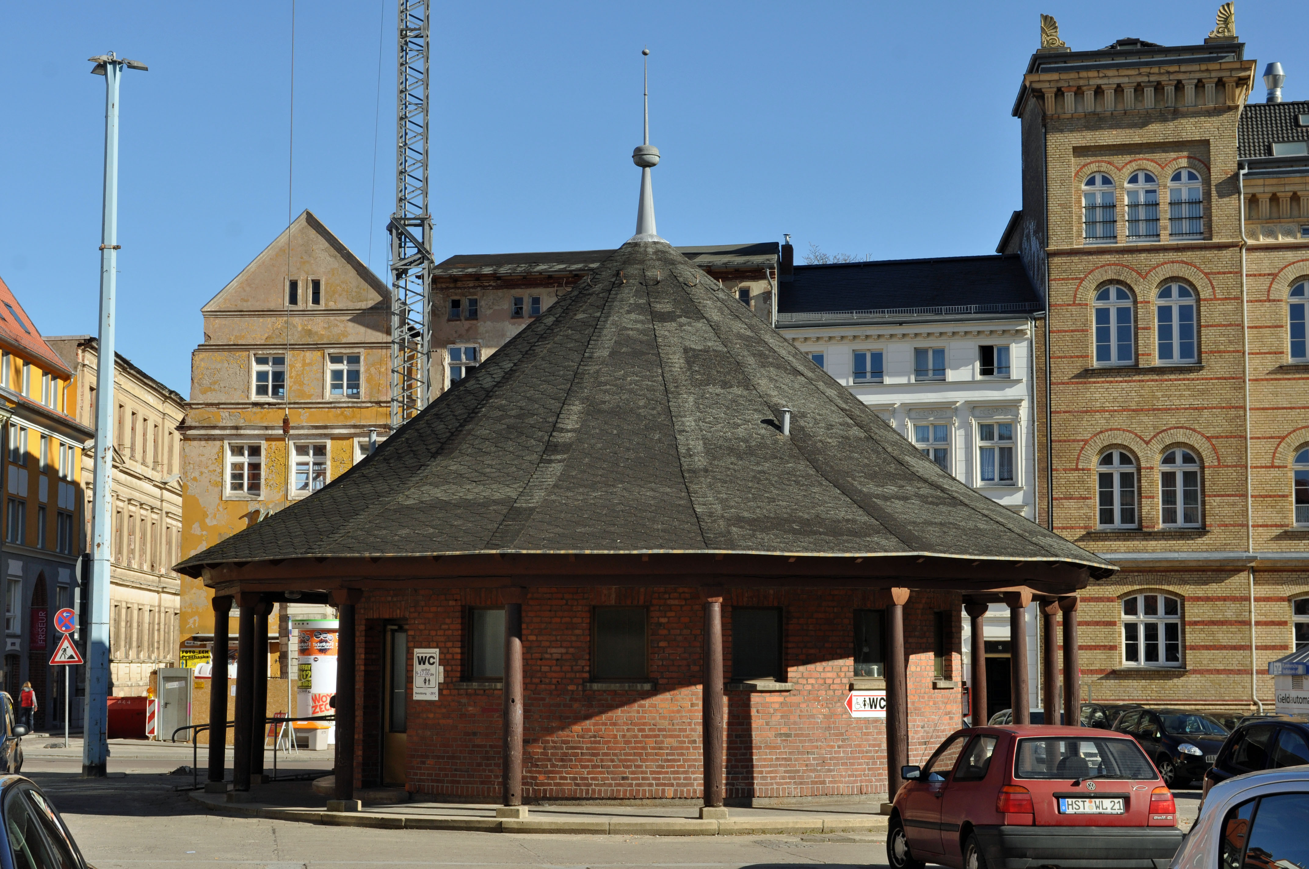 Gebäude bzw. Gebäudedetail in Stralsund. Straße und Hausnummer siehe Dateiname.